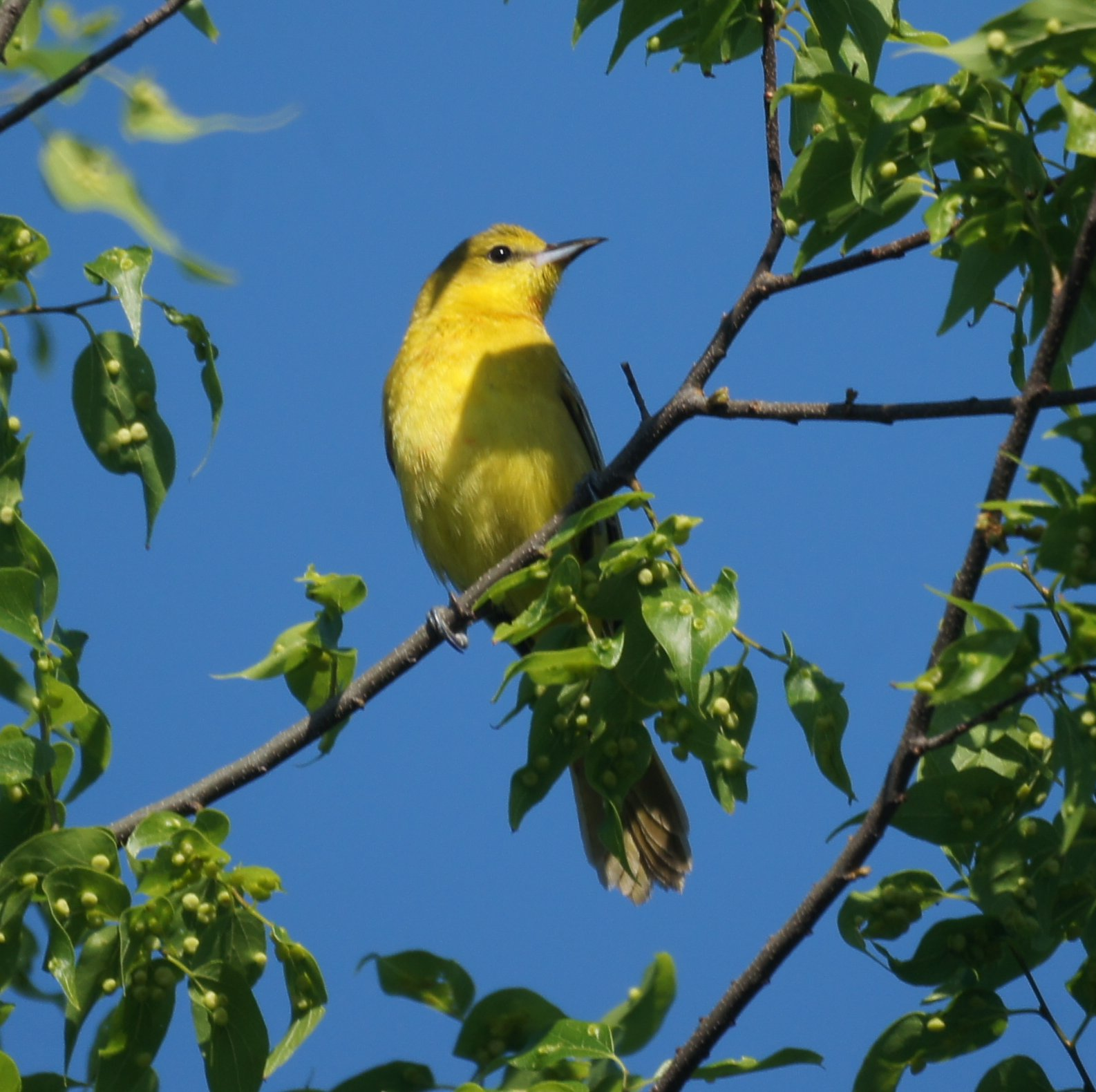 Dauphin Island Birds